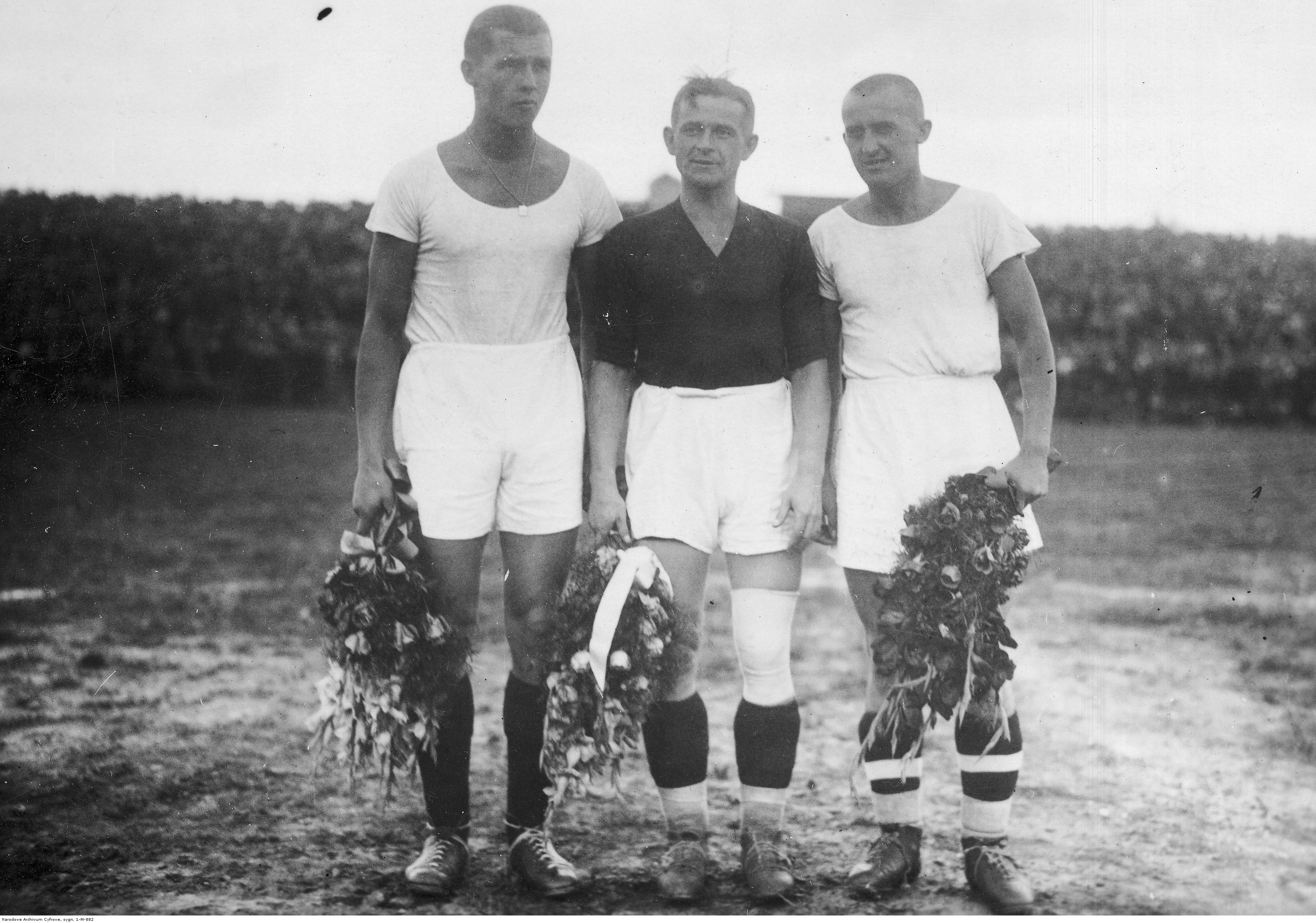 Powitanie piłkarzy biorących udział w Letnich Igrzyskach Olimpijskich w Berlinie przez zarząd Łódzkiego Klubu Sportowego. Stoją: Teodor Peterek, Antoni Gałecki, Gerard Wodarz.